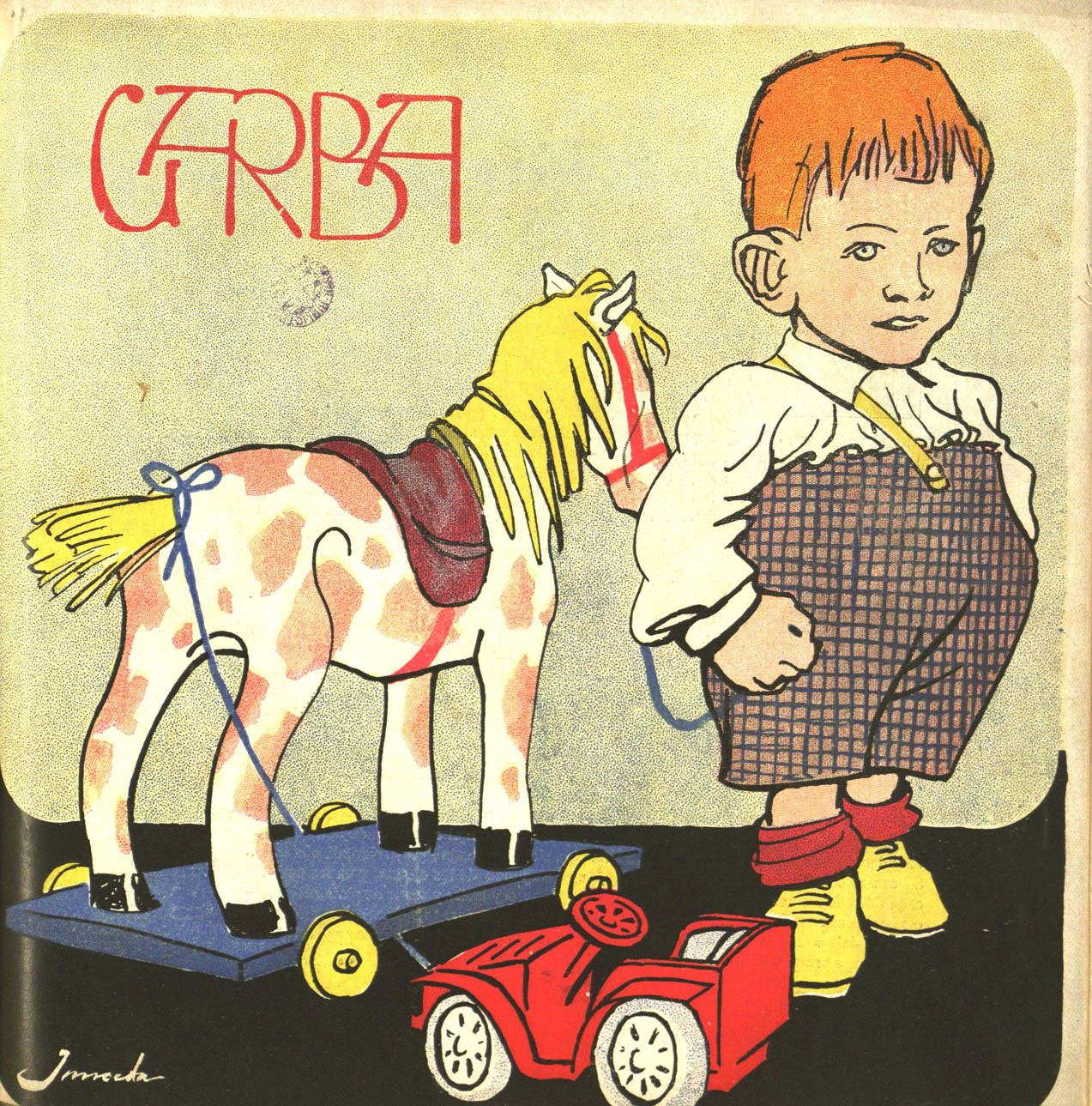 Garba (revista)